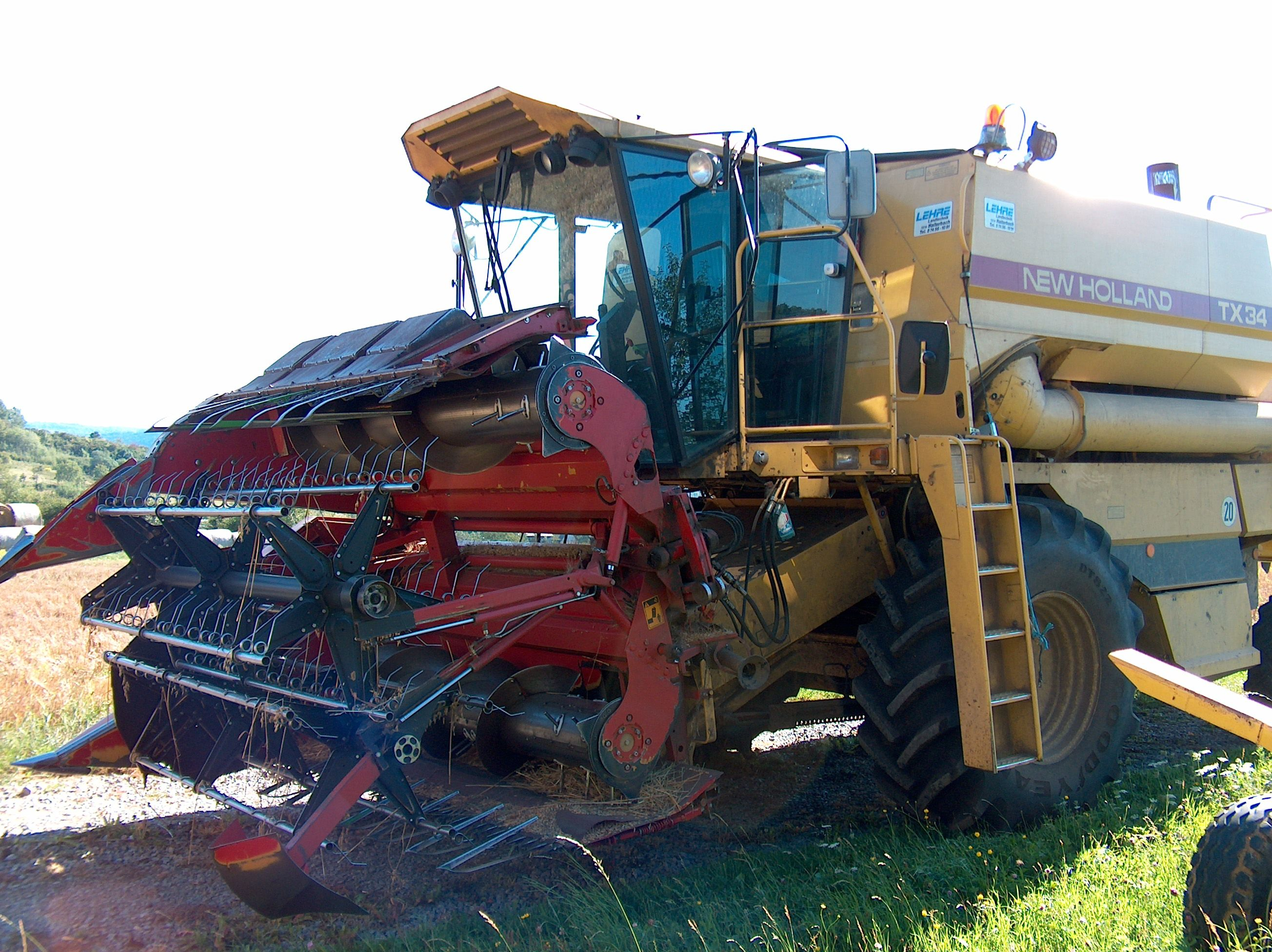 New Holland TX34 mit Klappmähwerk von Geringhoff